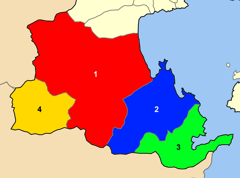 Χάρτης των ενοτήτων (και πρώην δήμων) από τις οποίες αποτελείται ο Δήμος Αλμυρού